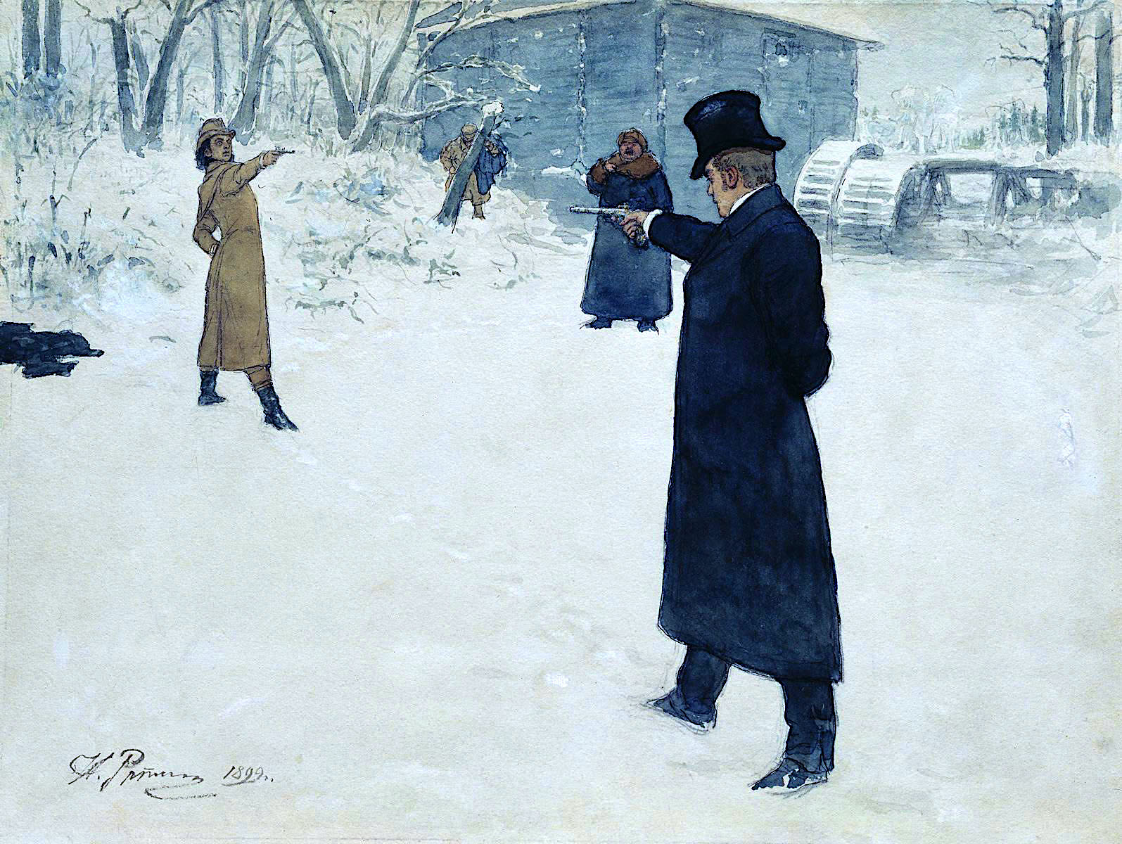 Illustration